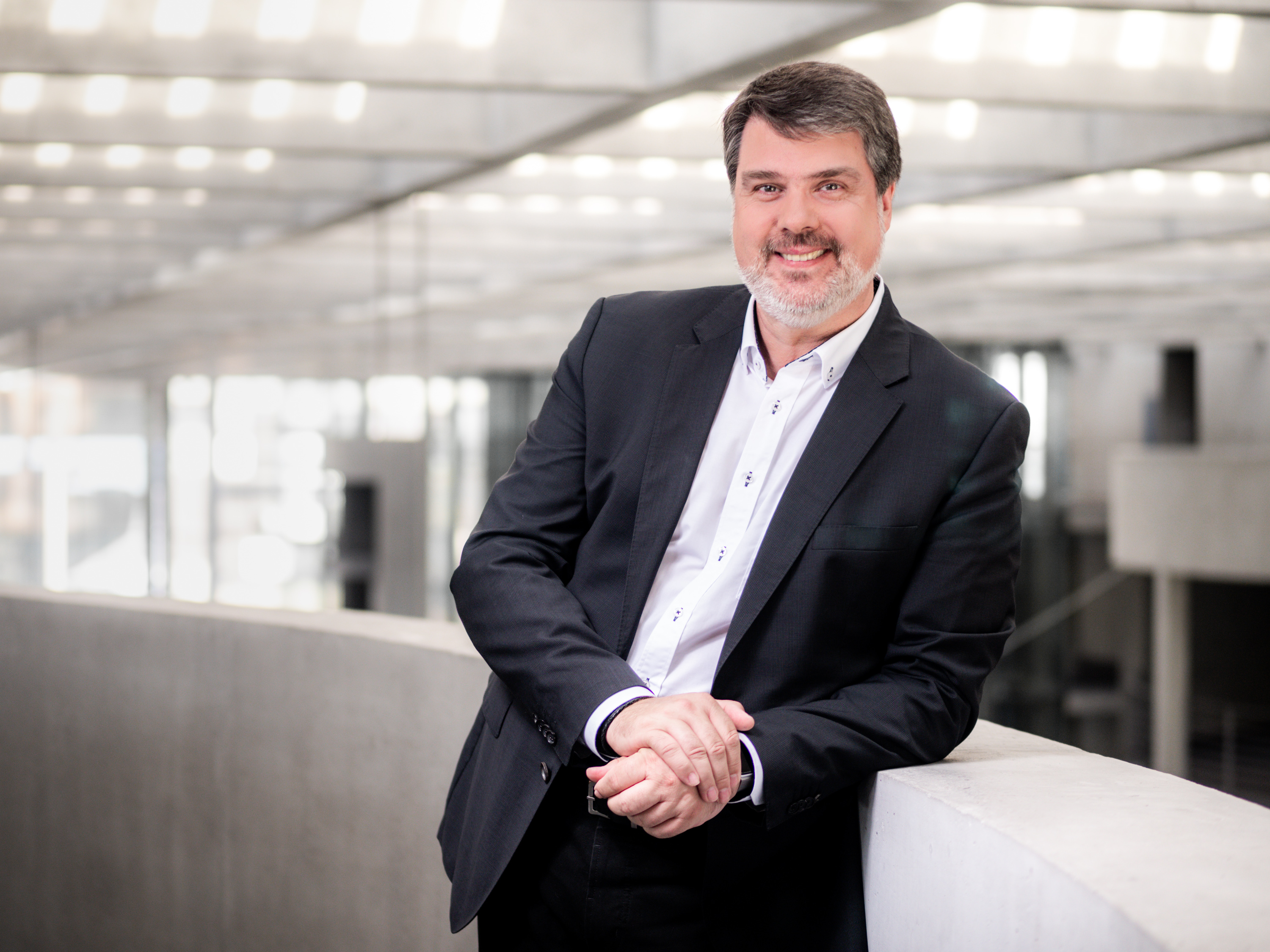 Bundestagsabgeordneter Michael Thews